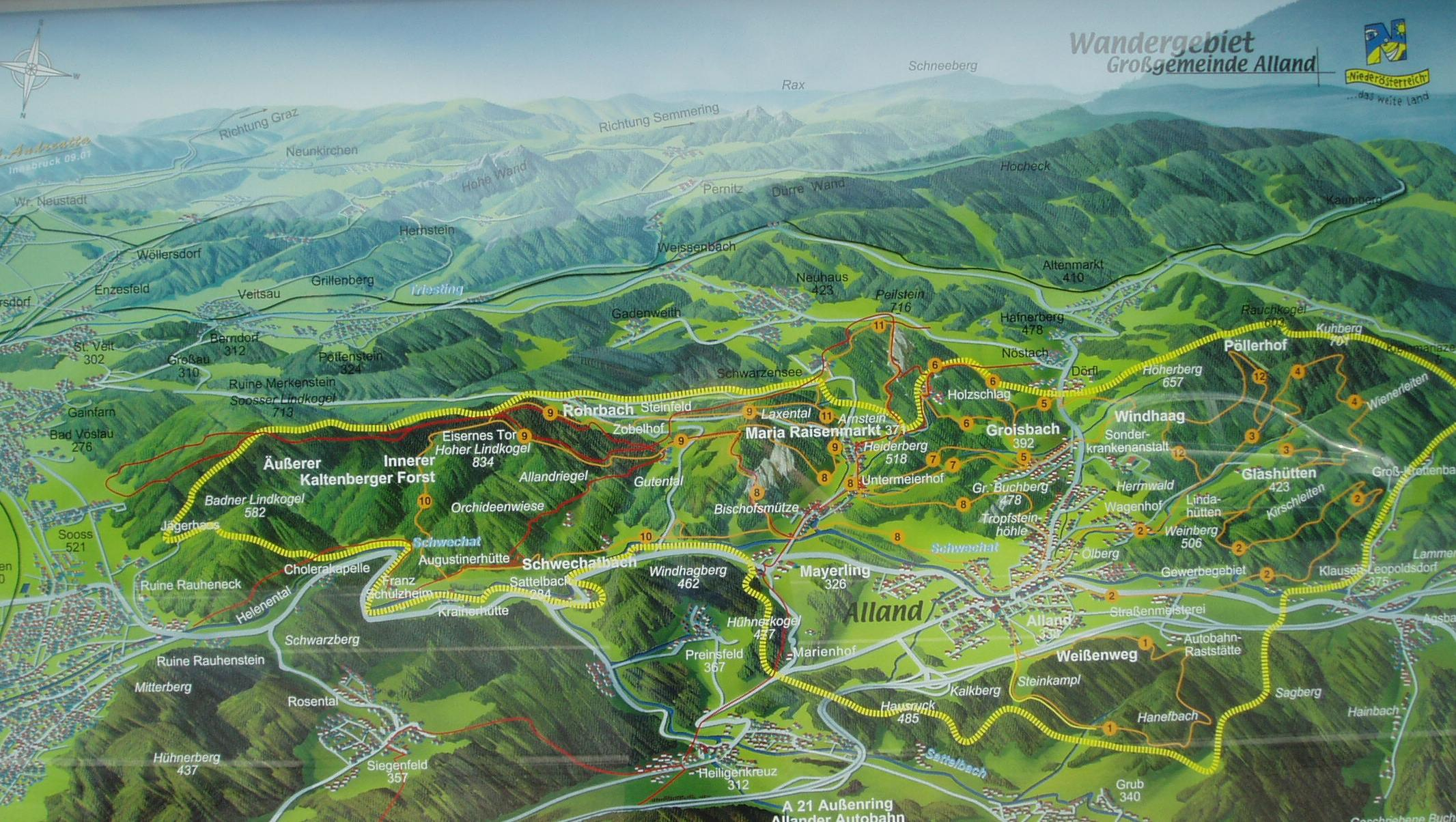 Foto des Wandergebiet Großgemeinde Alland auf einer Informationstafel beim Feuerwehrhaus Groisbach bei Alland.